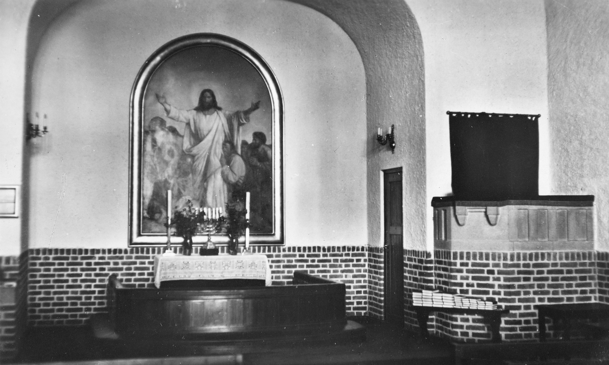 Koret og altertavlen i Piperviken småkirke, trolig fotografert på 1930-tallet. Ukjent fotograf for Abels Kunstforlag. Fra Byhistorisk samling hos Oslo Museum.